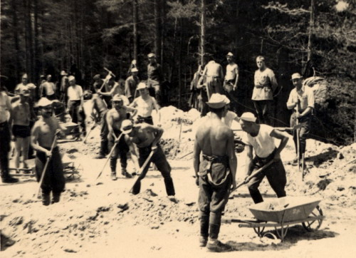 Българска принудителна трудова бригада